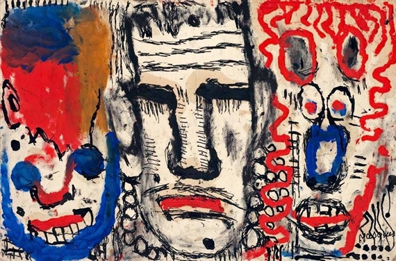 картины швейцарского живописца и графика Луи Суттера (фр. Louis Soutter, 1871 — 1942)